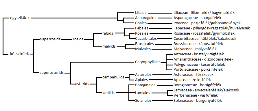 Néhány haszonnövény-család filogenetikus növényrendszertani osztályozása az APG IV-rendszer szerint. Az osztályozás az angol nyelvű APG IV system című Wikipédia-szócikk alapján készült.